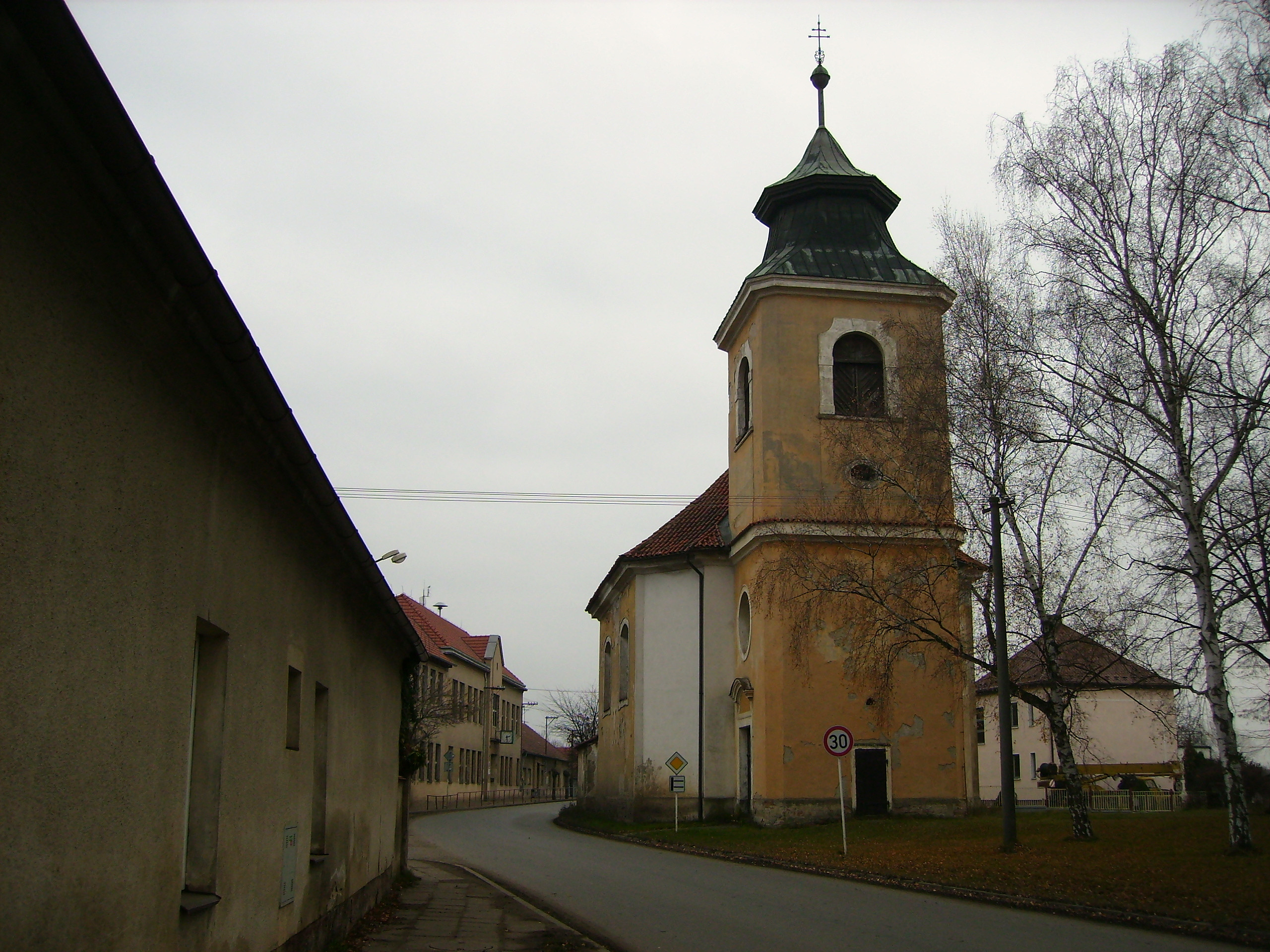 Kostel sv. Maří Magdaleny v Semicích. Autor: Petr Vilgus